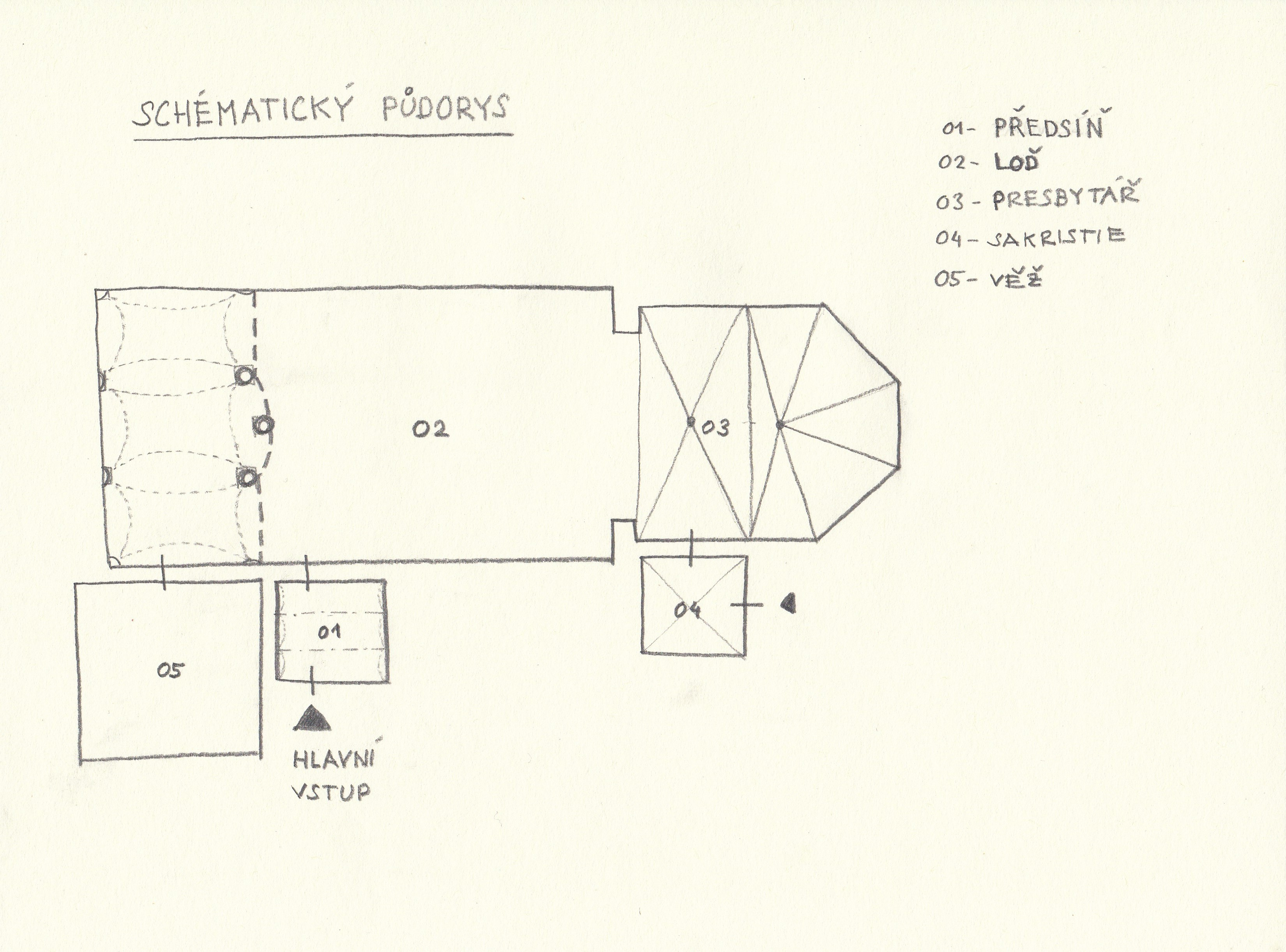 Schématický půdorys